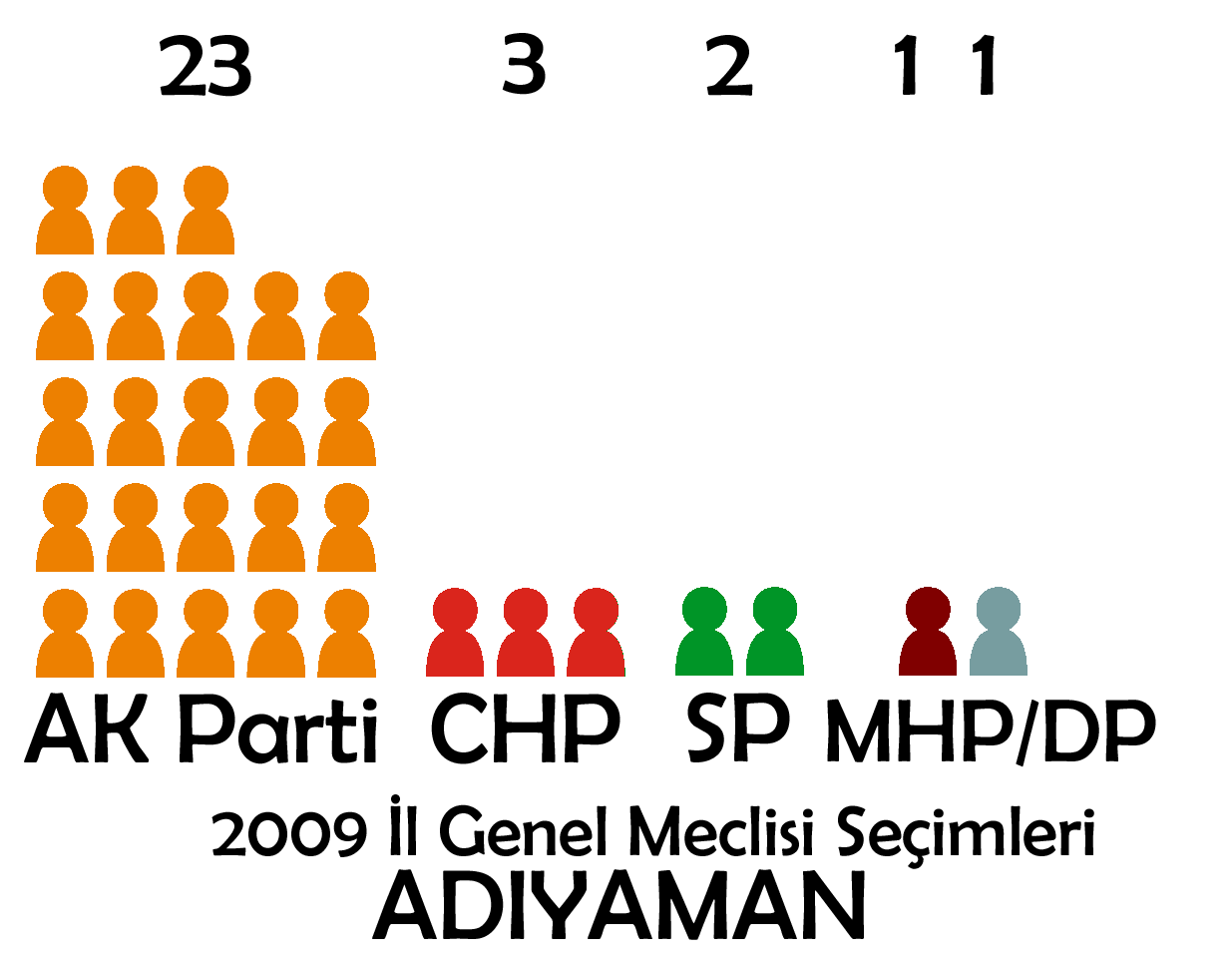 Adıyaman